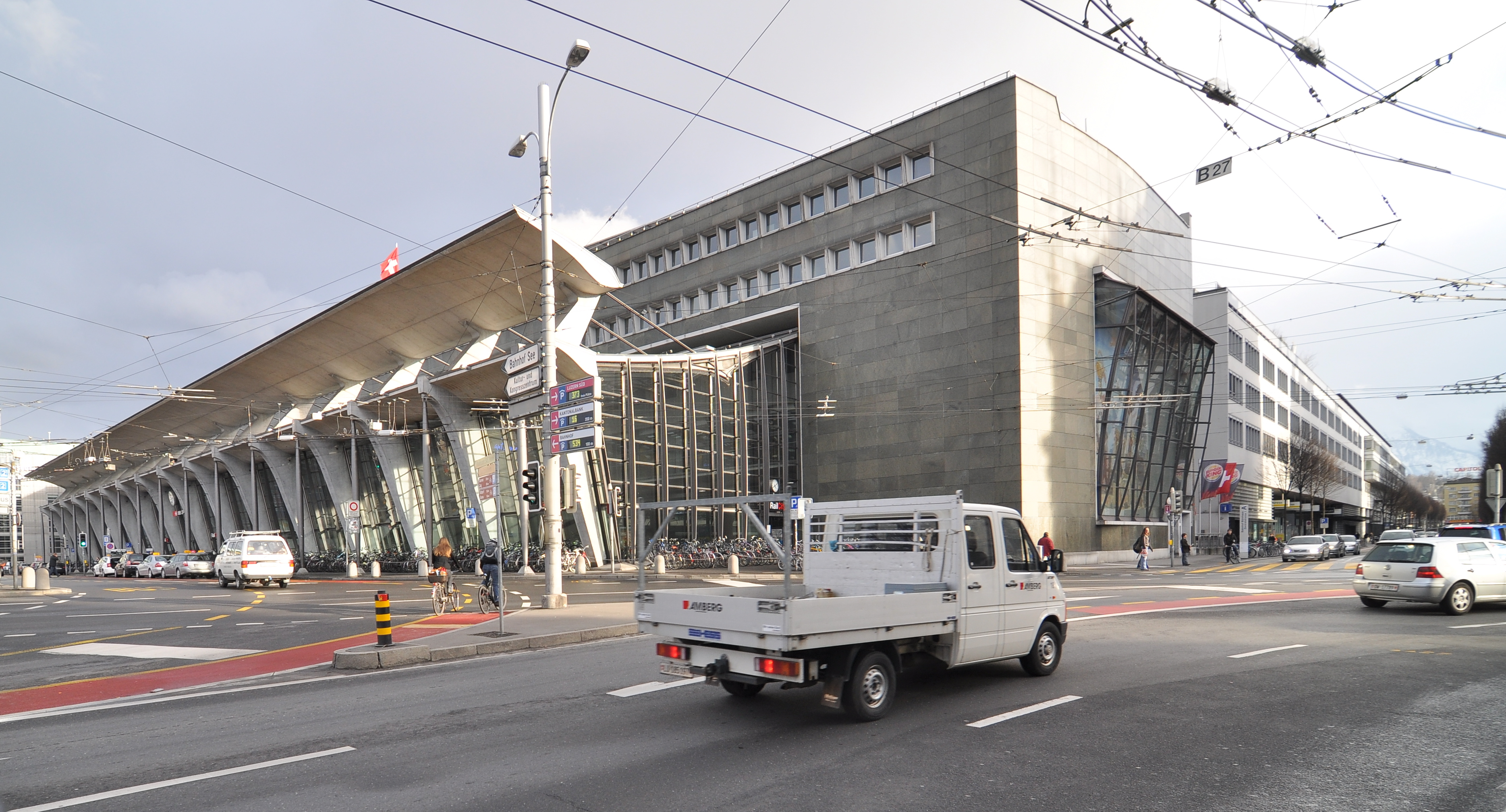 Bahnhofsüberbauung Luzern, Architekten: Ammann und Baumann, Mitarbeit, Entwurf Vorhalle: Santiago Calatrava 1981—91